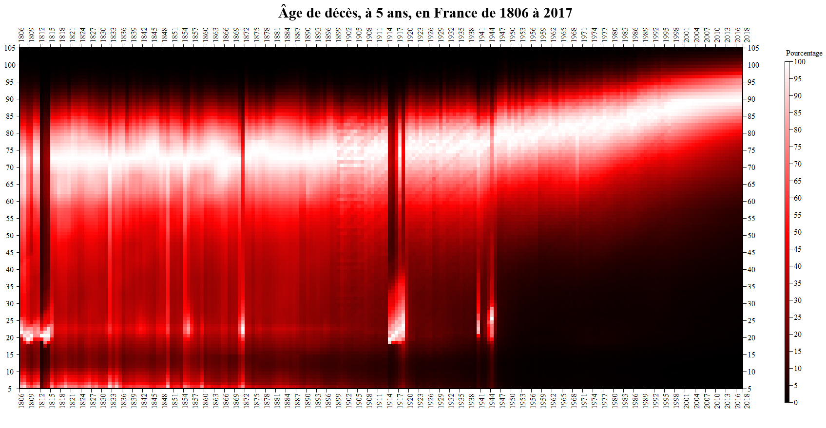 Évolution d'âge de décès à 5 ans en France de 1806 à 2017 (Source: INED) Pourcentage du nombre de décès de l'âge avec le plus important taux de décès. Légende: Pourcentage du maximum de morts d'une année en fonction de l'âge. (ex: en 2017, le plus fort tôt de mortalité était pour les 89 ans, 4 607 morts sur 100 000; 4 607 morts = 100%, pour les 70 ans, il y a 1 140 morts sur 100 000, soit 24,8% de 4 607 morts) Blanc = 100% du maximum de mort de l'année pour l'âge en abscisse. Rouge = 50% du maximum de mort l'année pour l'âge en abscisse. Noir = 0% du maximum de mort de l'année pour l'âge en abscisse.